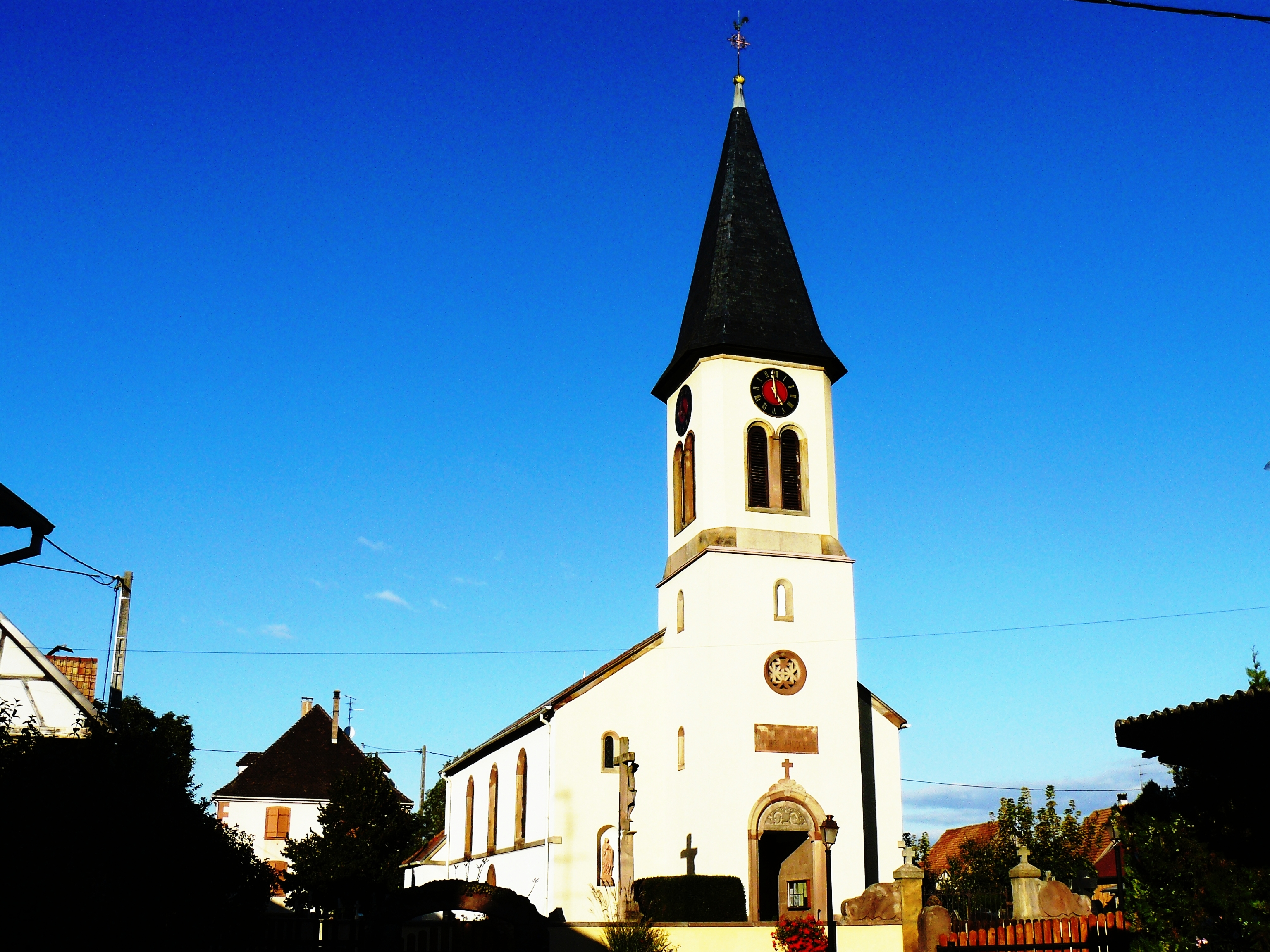 Église catholique Saint-Jacques